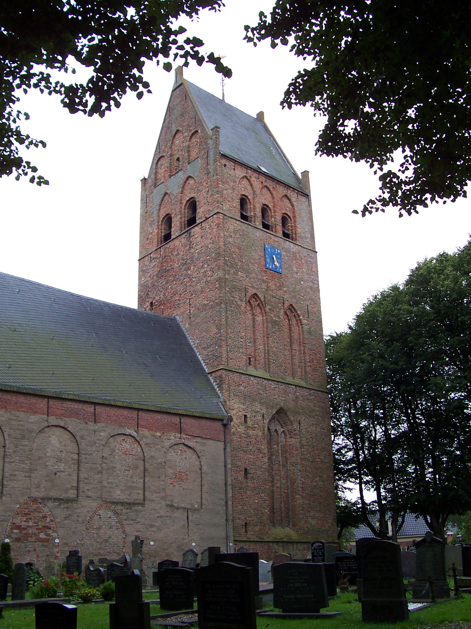 Stiens - St.-Veit-Kirche